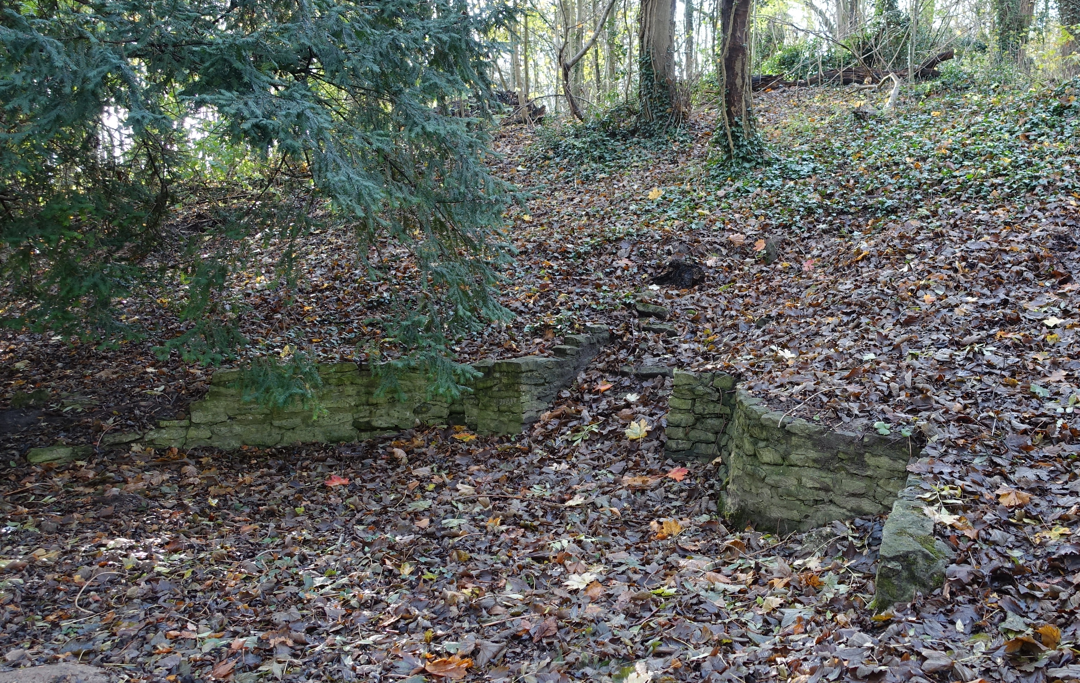 Restanten van trappen en landschapspark van het oude domein L'ecluse, nu Domein Drie Fonteinen